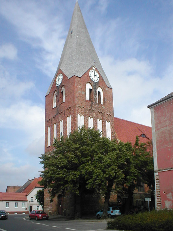 Johanneskirche in Neukalen, Mecklenburg-Vorpommern, Deutschland